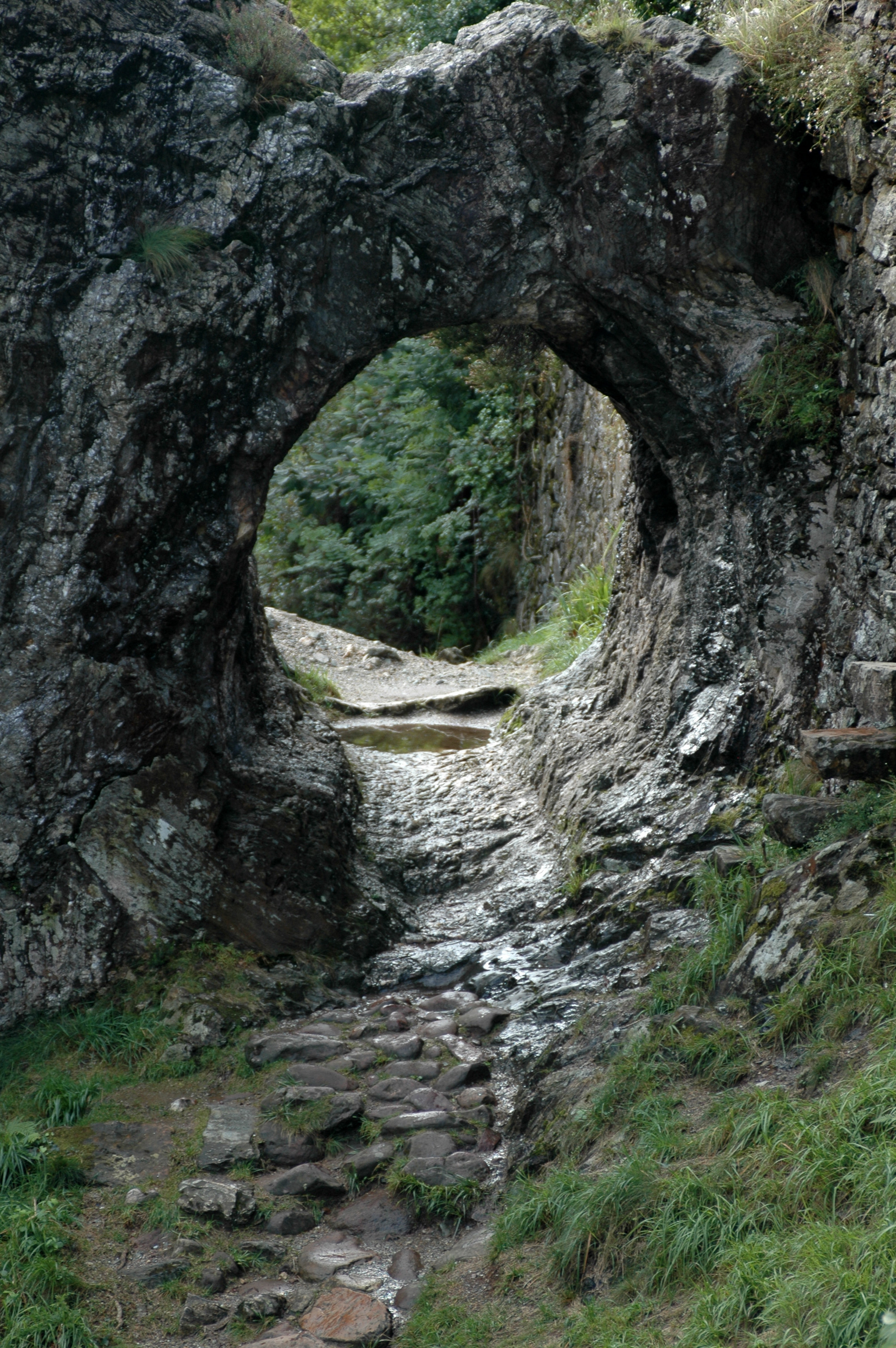 Itxassou, le Pas-de-Roland, le long de la Nive.